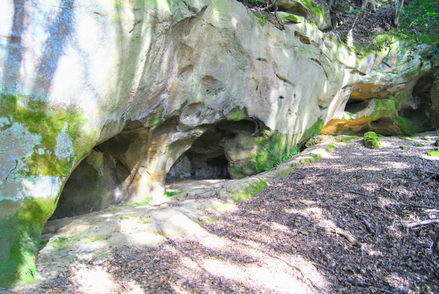 長崎県佐世保市にある旧石器時代の遺跡。